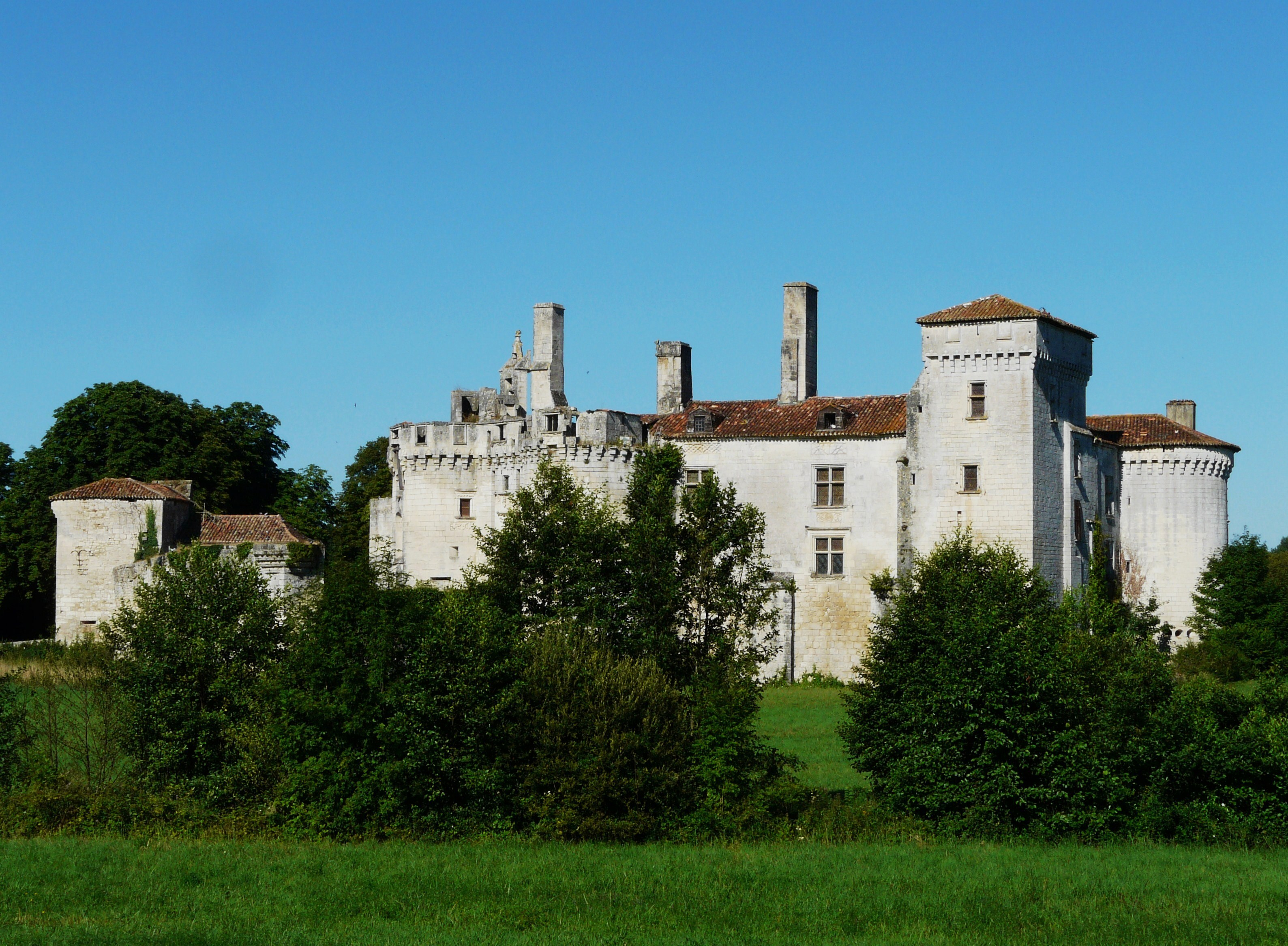 Le château de Mareuil, Dordogne, France Object location 45° 27′ 14.50″ N, 0° 27′ 5.30″ E This and other images at their locations on: Google Maps - Google Earth - OpenStreetMap - Proximityrama(Info)